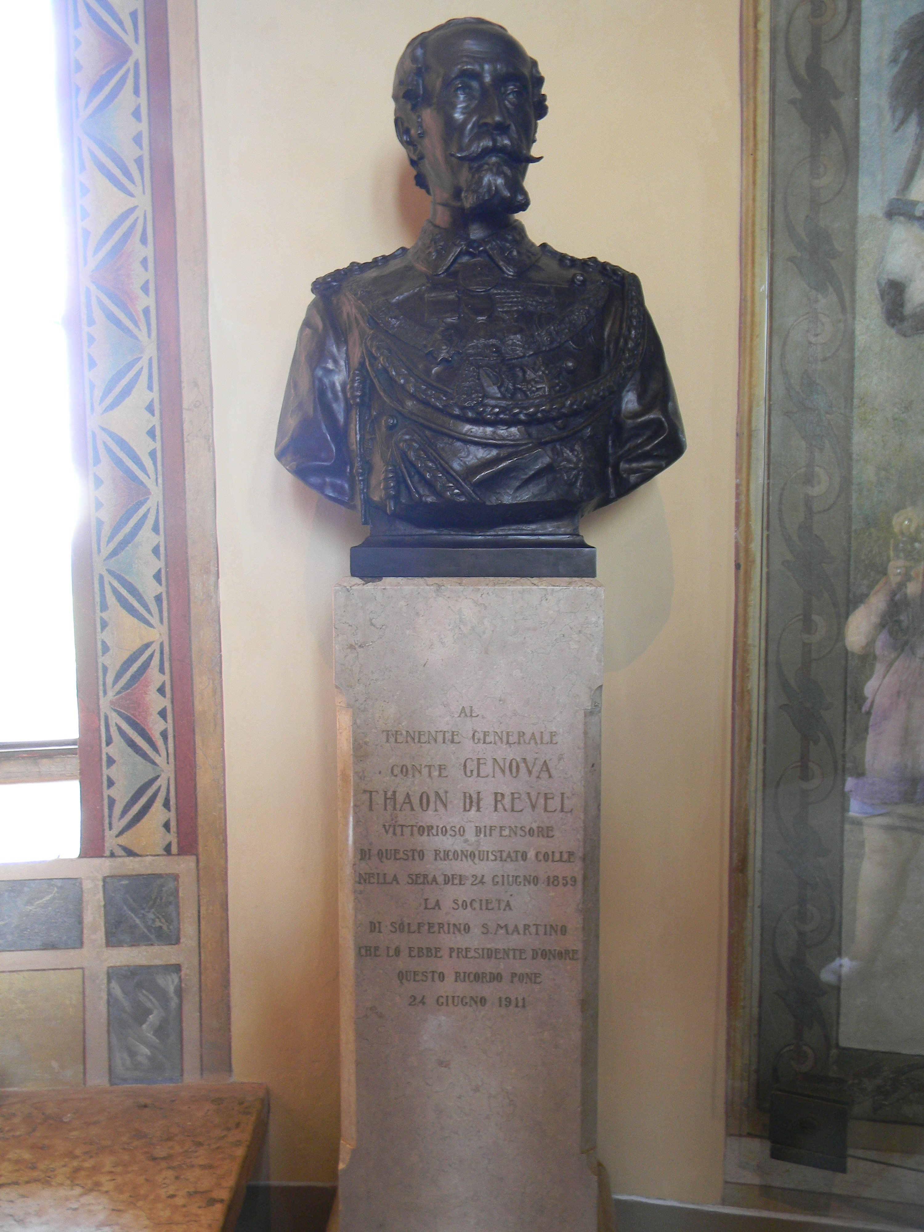 Buste de Genova Giovanni Thaon di Revel, depuis la tour de San Martino, Italie